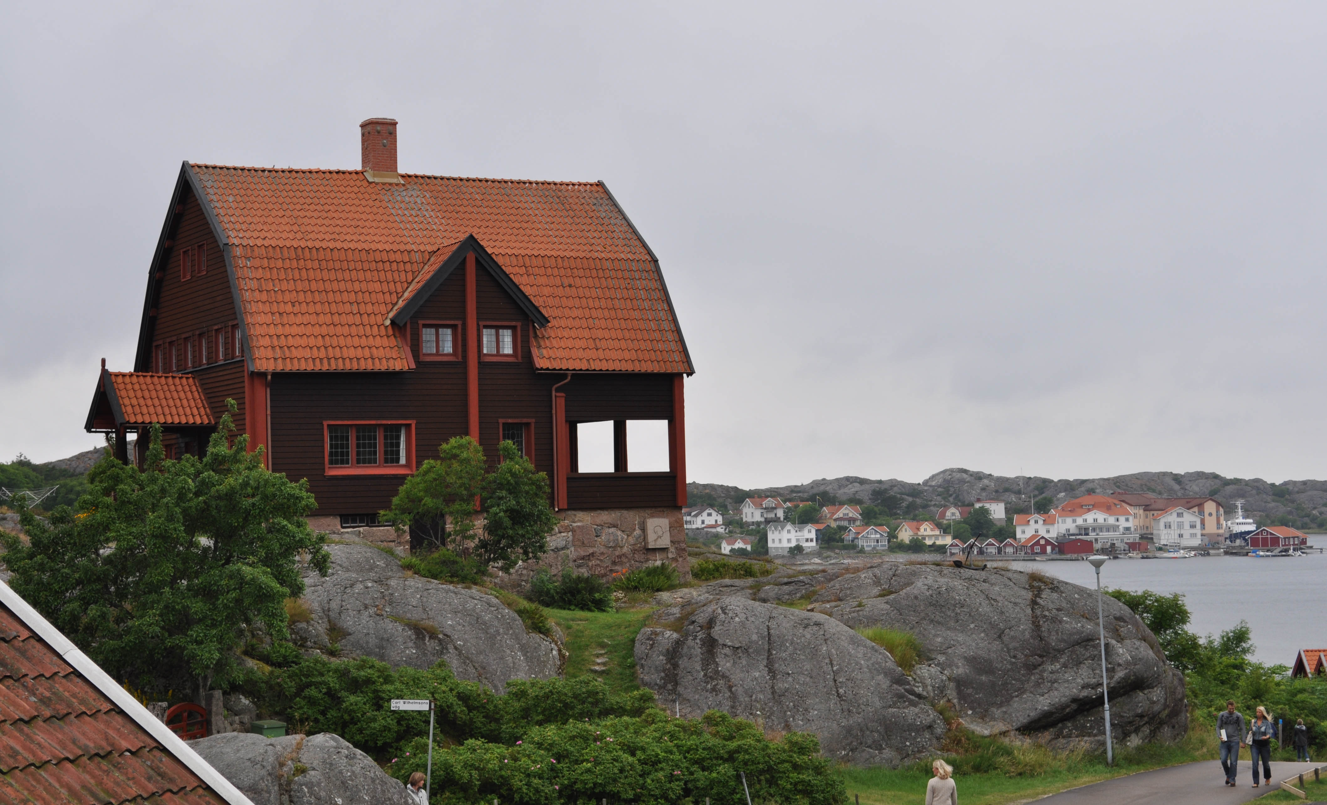 Carl Wilhelmsons ateljé i Fiskebäckskil. Byggnadsår 1913. Arkitekt Ivar Callmander